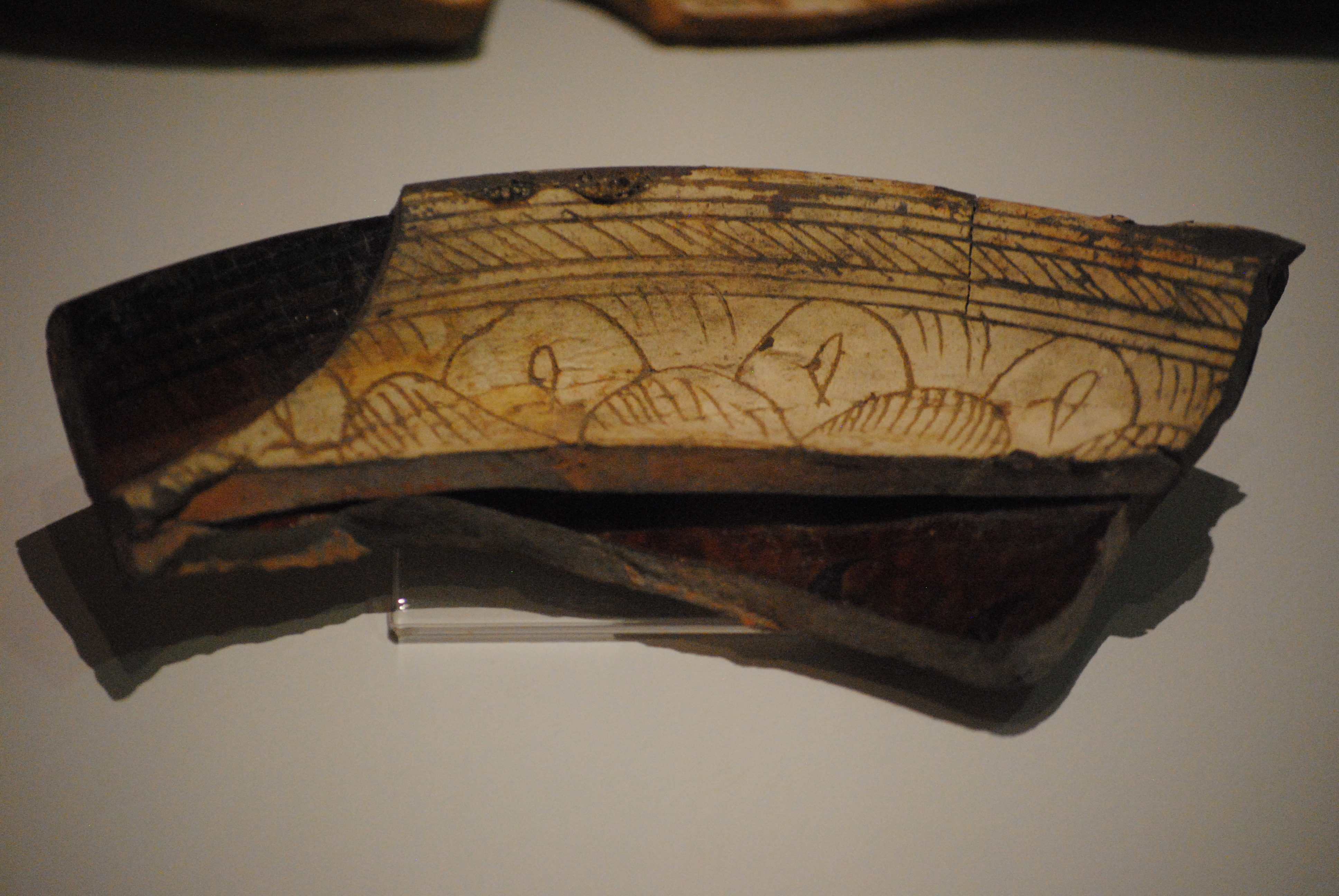 Esemplare ingobbiato e graffito rimasto attaccato ad un manufatto invetriato durante la cottura.